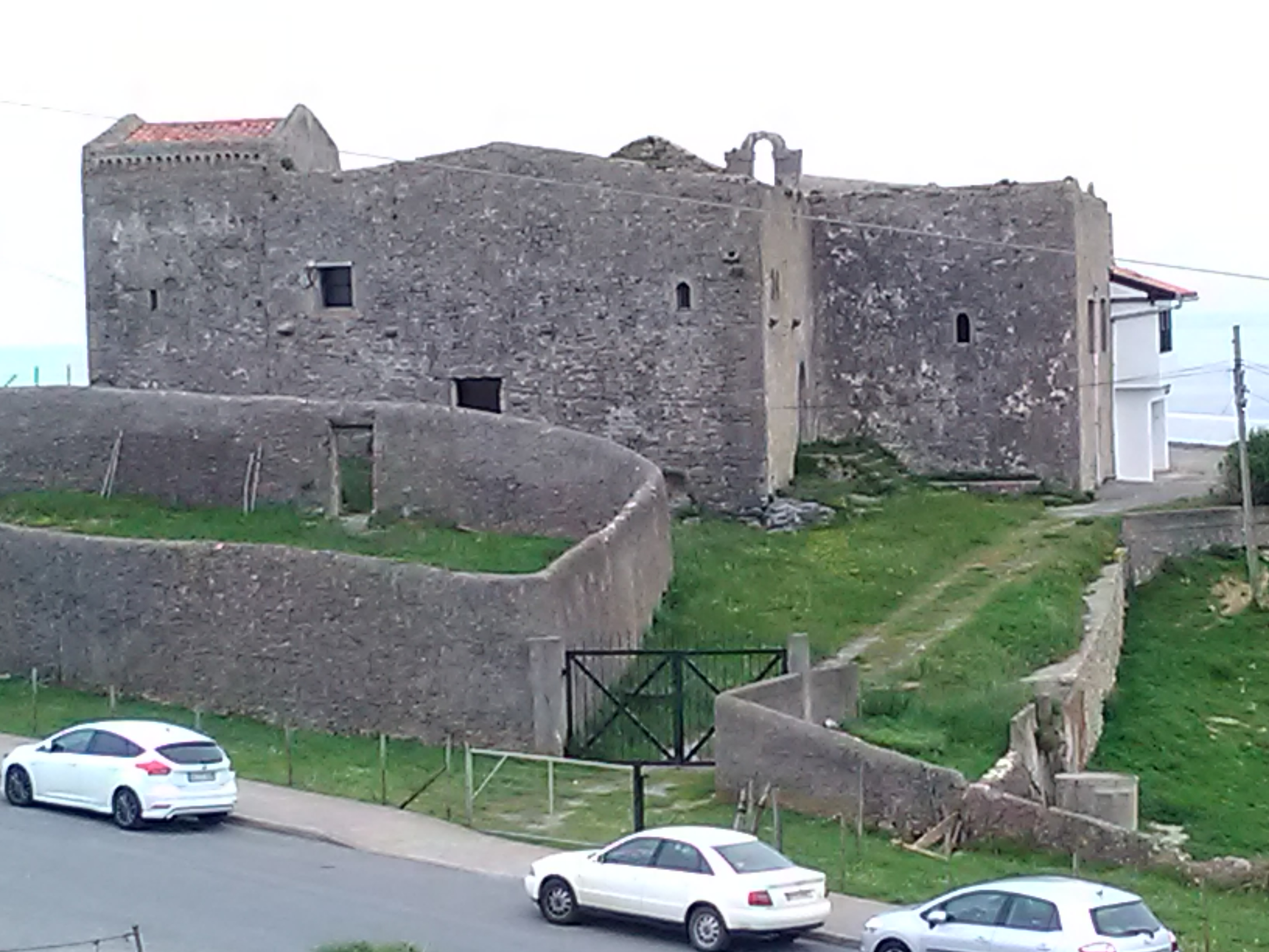 Antzorizko Santa Katalina baseliza (Lekeitio).